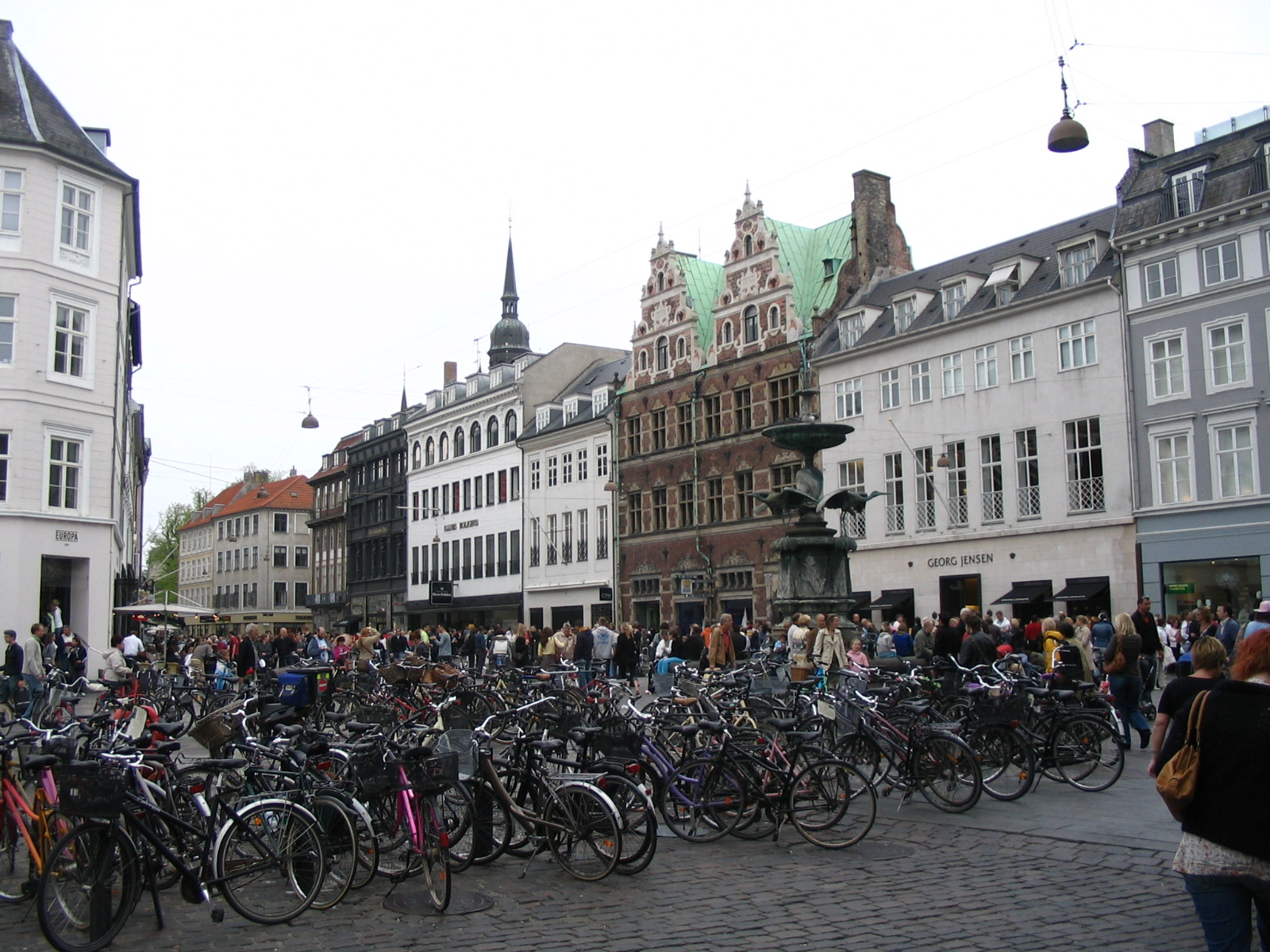 Kopenhaageni kesklinn